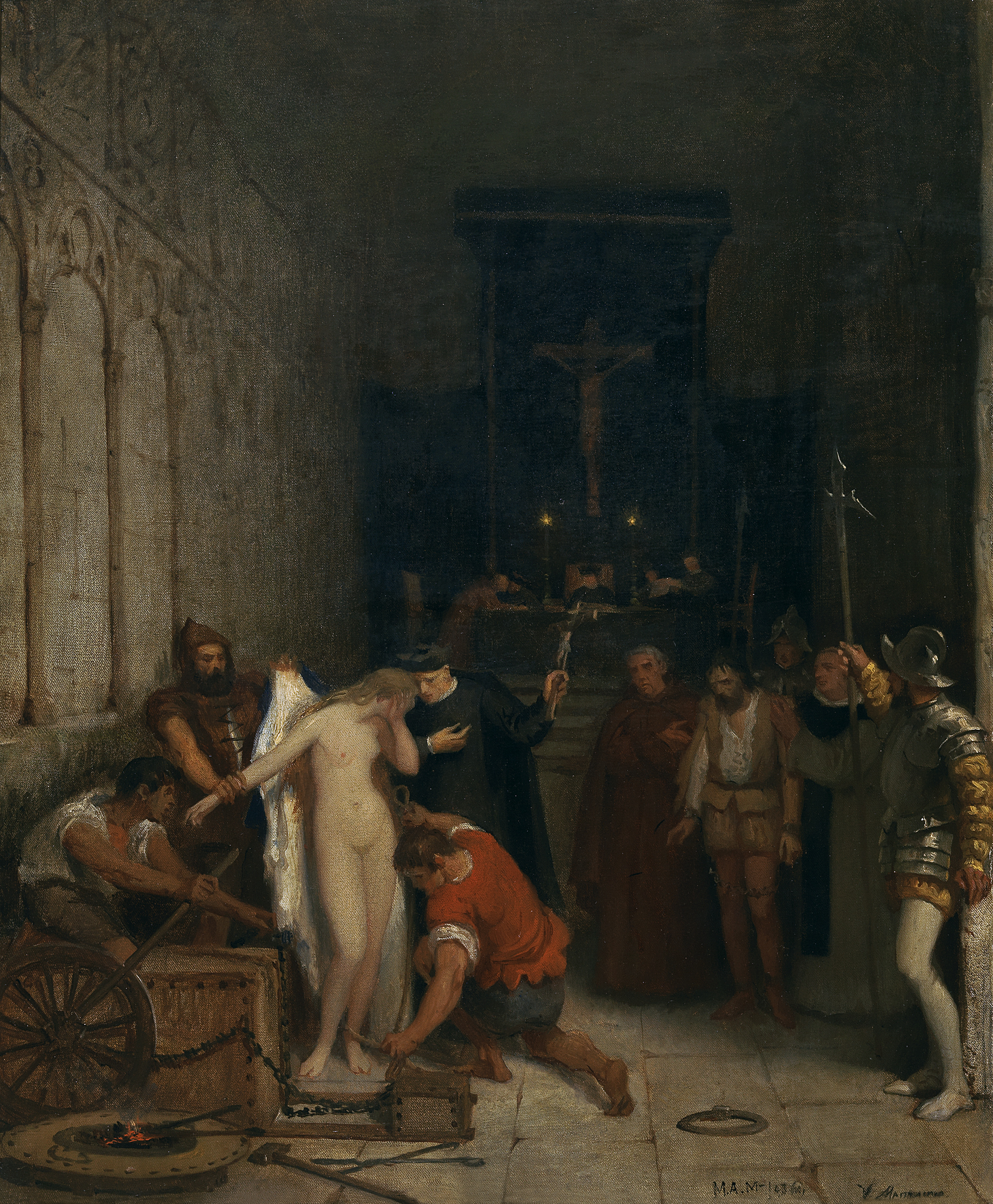 En esta obra una mujer desnuda está a punto de ser torturada por la Inquisición, y es un boceto preparatorio de un cuadro de mayores dimensiones que en 1866 pertenecía a la familia del artista.